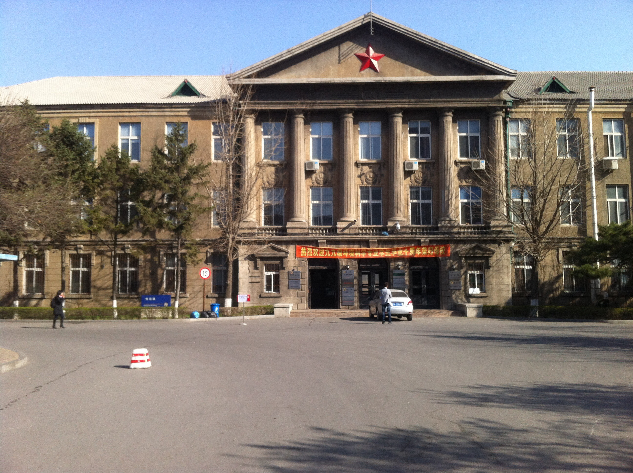 辽宁大学老校区